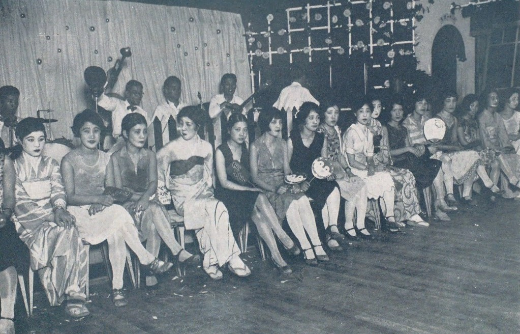 四谷の国華ダンスホール